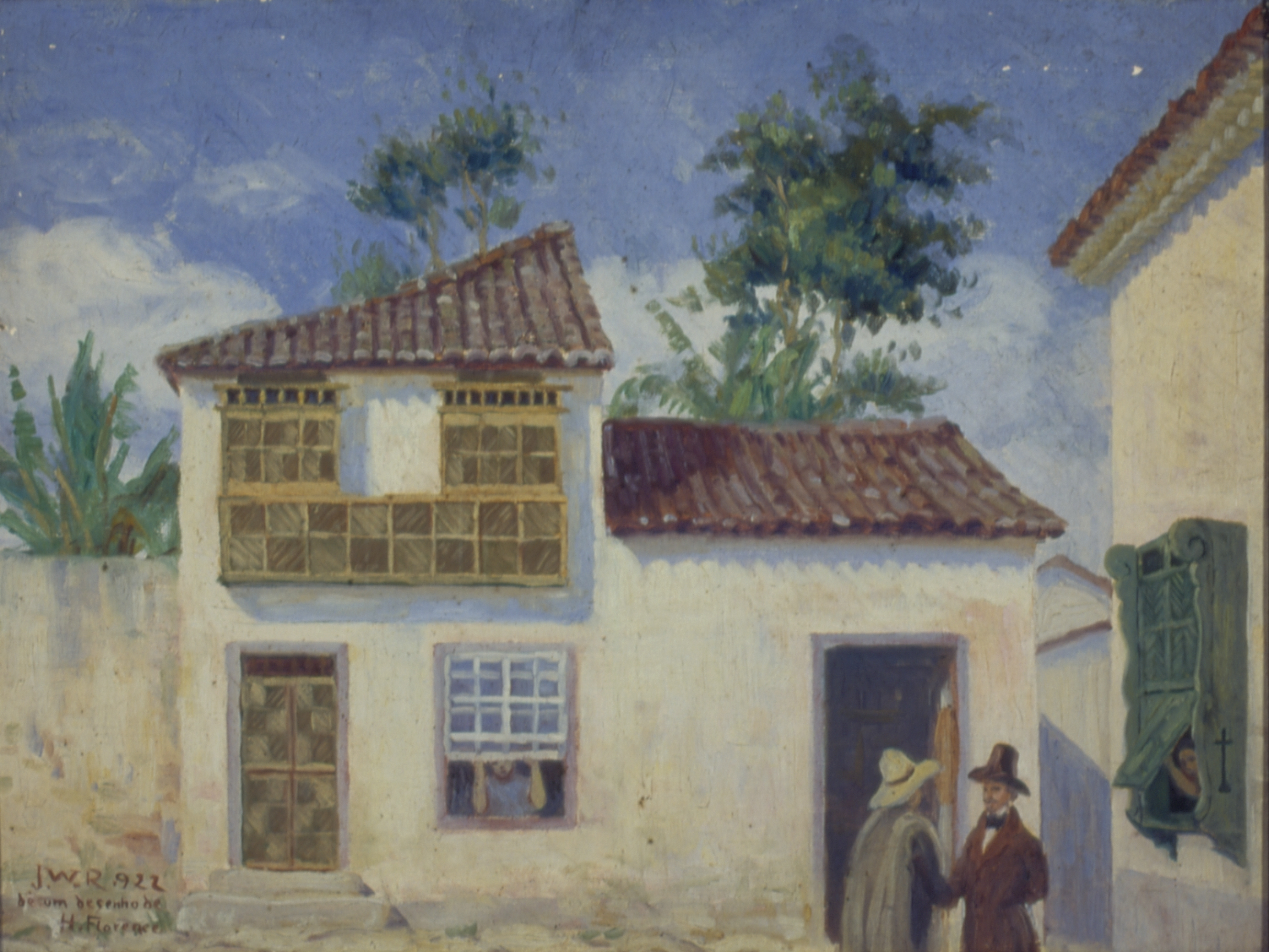 Obra que integra o acervo do Museu Paulista da USP. Coleção José Wasth Rodrigues - CJWR